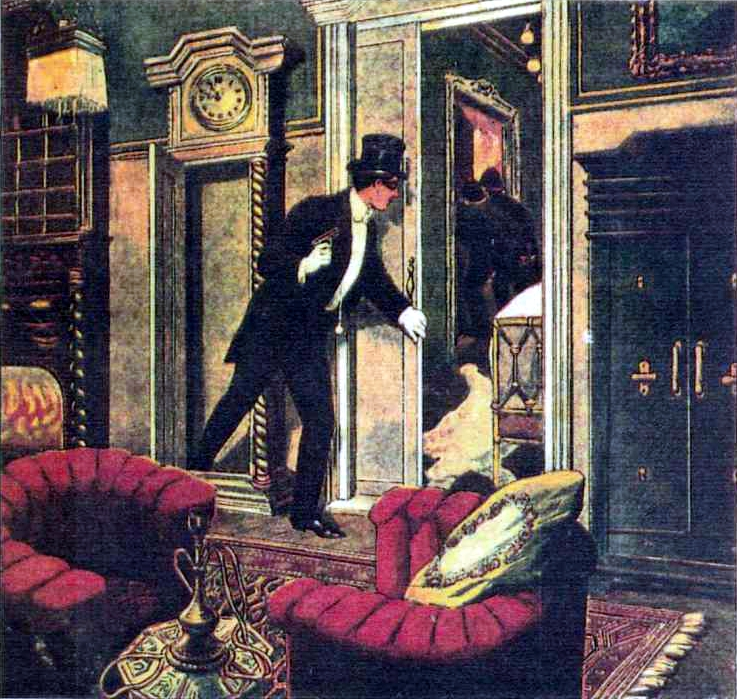 Rysunek tytułowy na okładce.